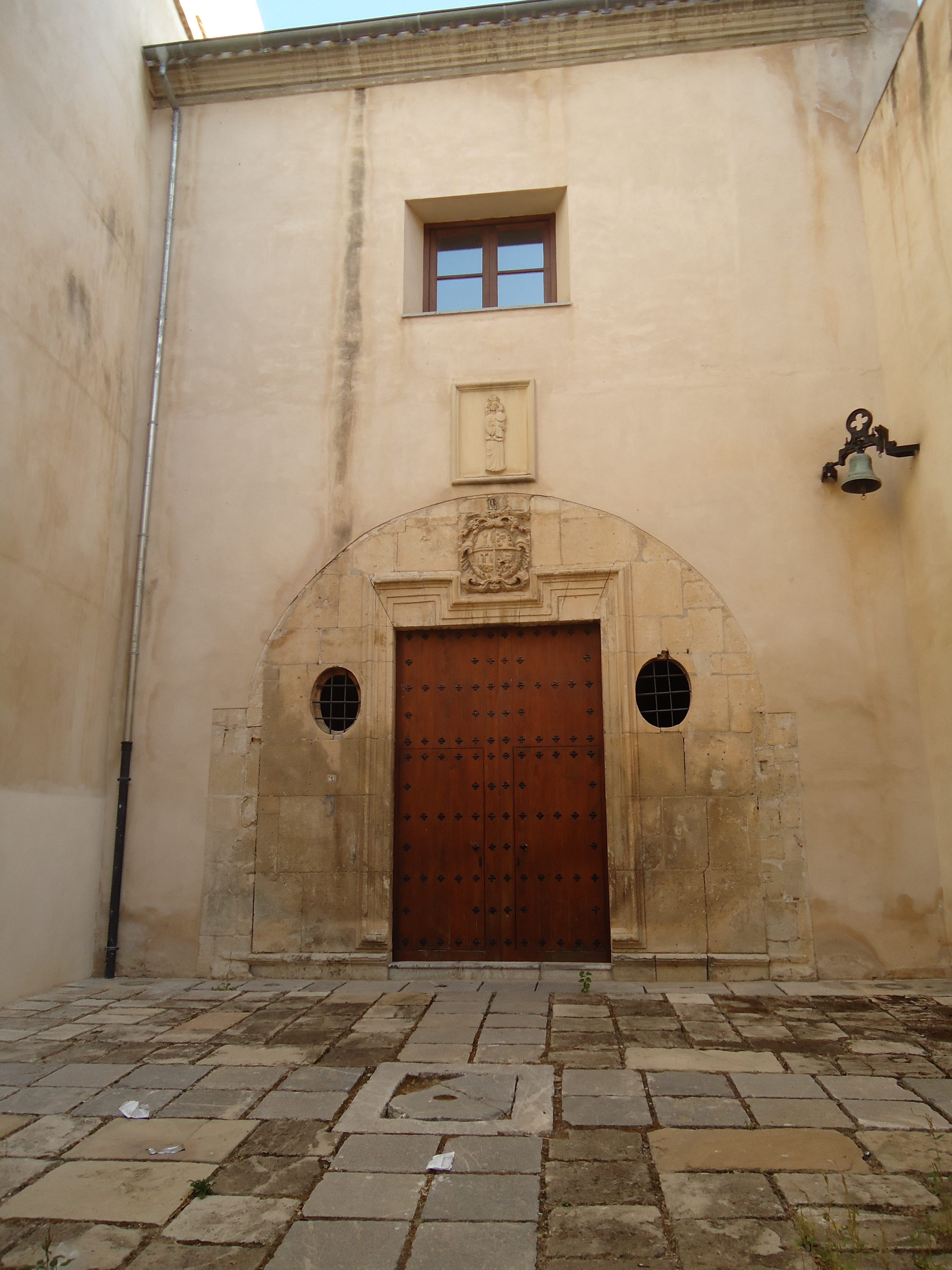 Fachada de la capilla de Loreto, en el exterior de la catedral de Orihuela (Comunidad Valenciana, España)